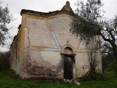 Descrizione: Chiesa di Sant'Anna Autore: Domenico Sergio Antonacci Data pubblicazione: 12/12/2009